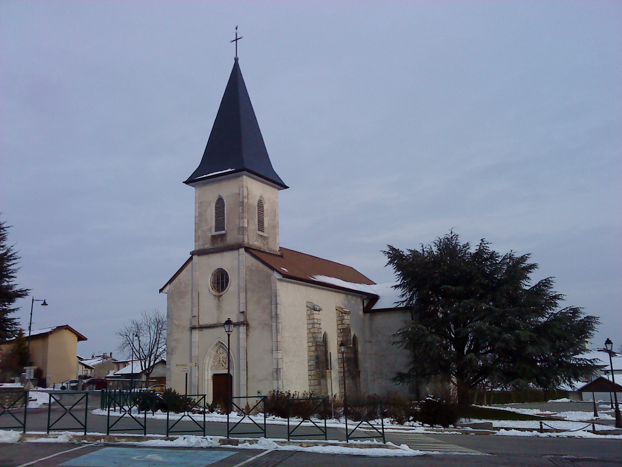 Église (Saint-Jean-Baptiste) de Saint-Jean-de-Gonville, Ain, France